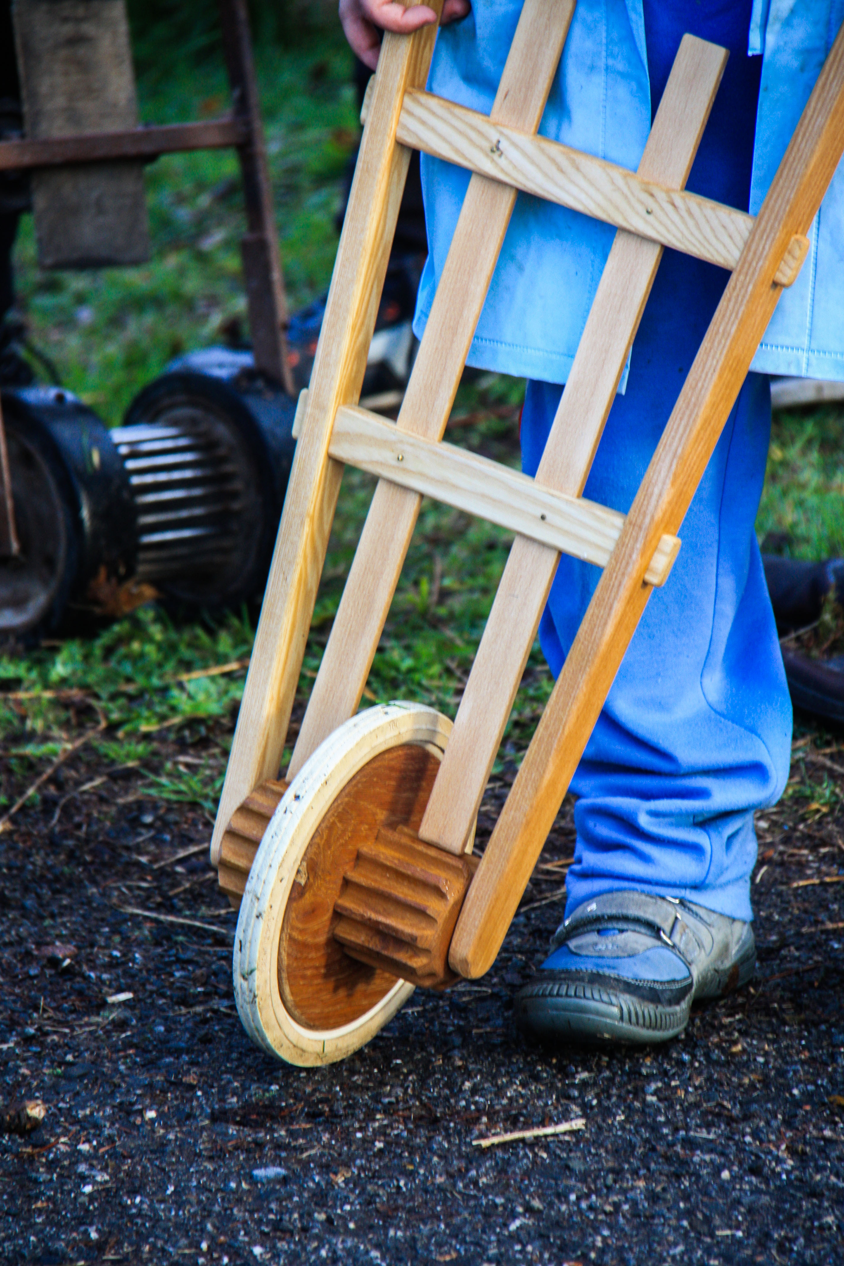 Terkotka taczkowa. Klepotarze (klapotáři) obchodzą domy ze swoimi klapotkami (rapači).